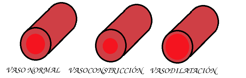 Diagrama que muestra la vasodilatación y la vasoconstricción en las arterias.